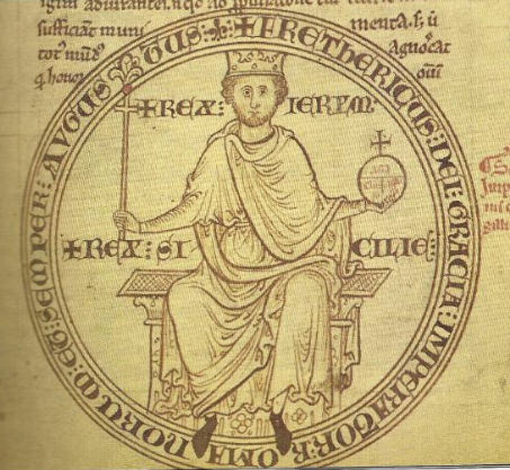 Pečeť Fridricha II. Štaufského